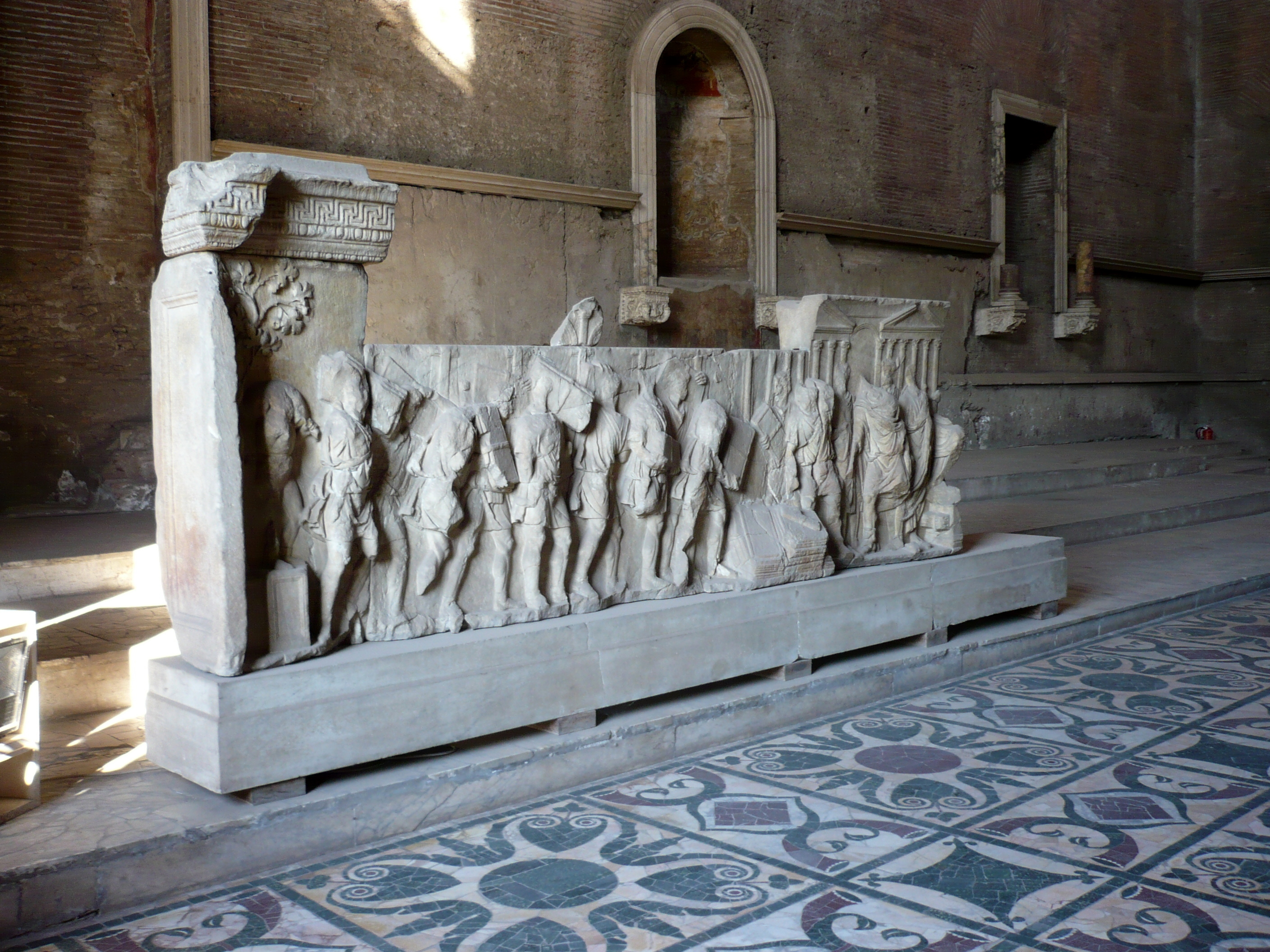 Curia Iulia a Roma: fregio romano (sinistro). Si noti il pavimento in opus sectile.